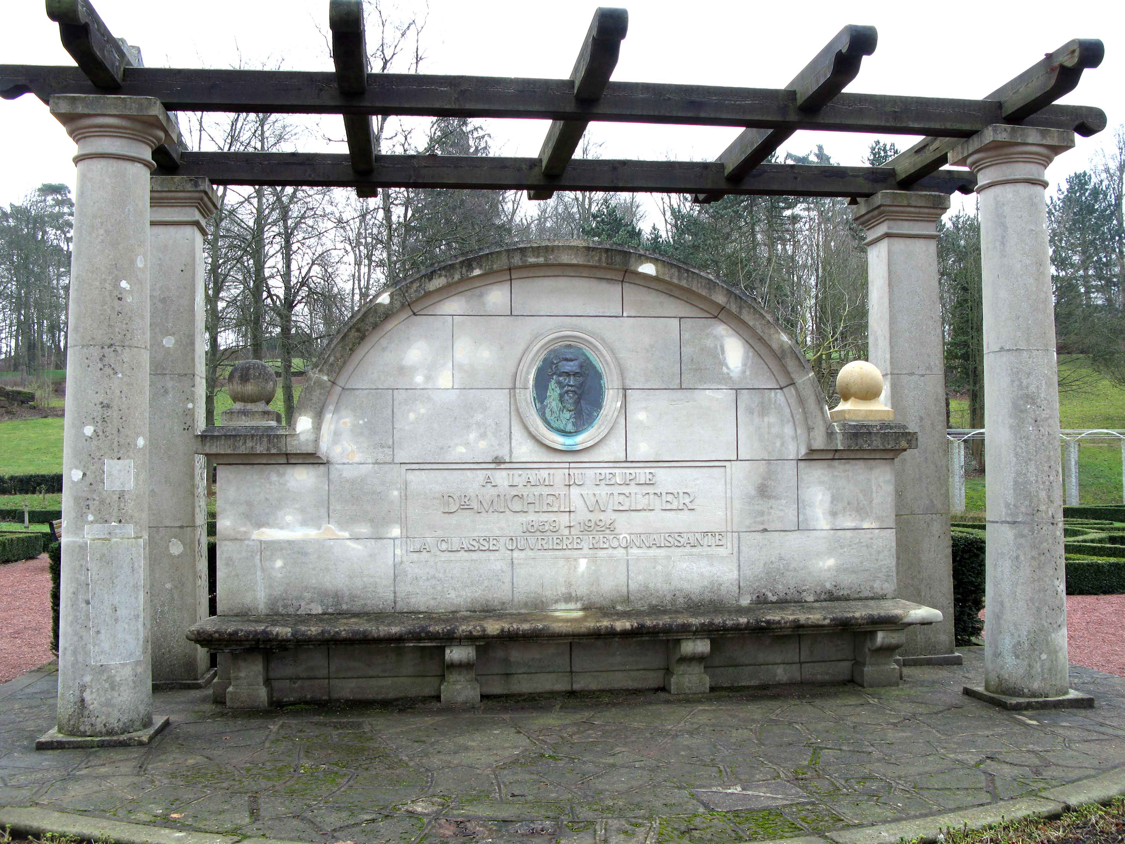 Michel-Welter-Monument um Escher Gaalgebierg.